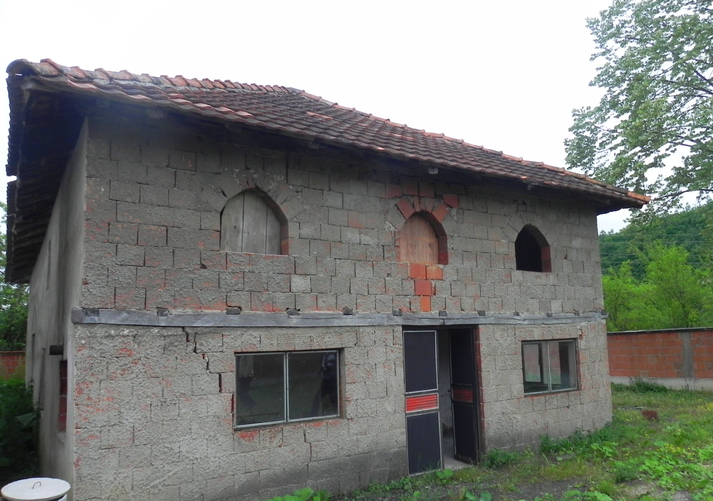 Monument Kulturor